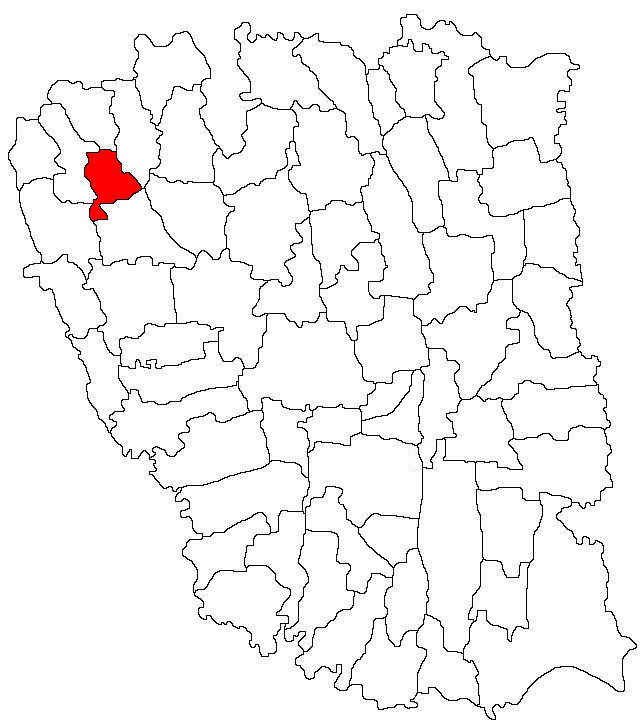 Categorie:Hărţi ale judeţului Galaţi